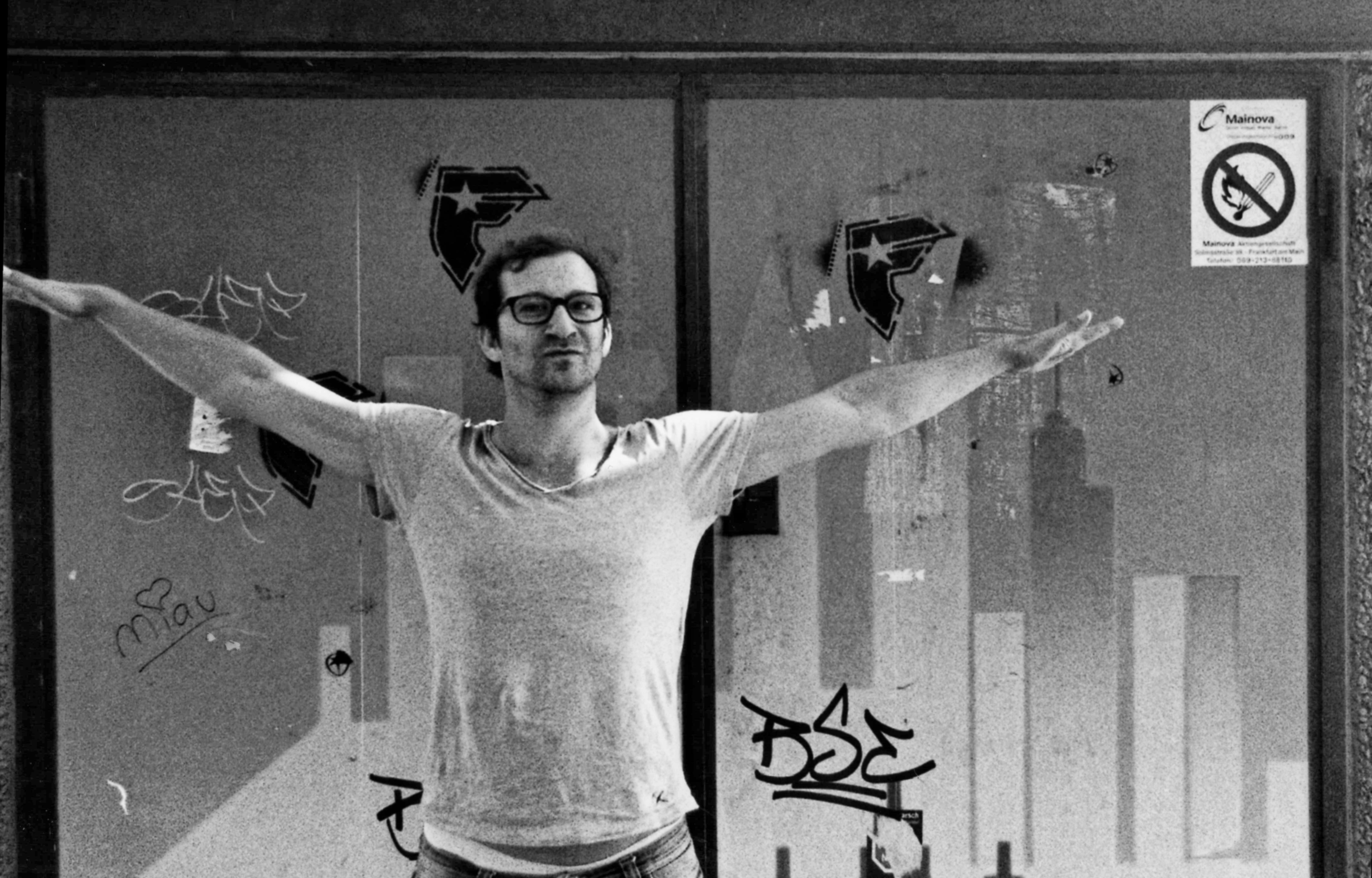 Jannis Plastargias (* 1975), griechisch-deutscher Diplom-Pädagoge, Kulturaktivist, Autor und Blogger. (Aufnahmedatum: 24.9.2010; Ort: Frankfurt-Westend; Foto: Paul Kuhn)